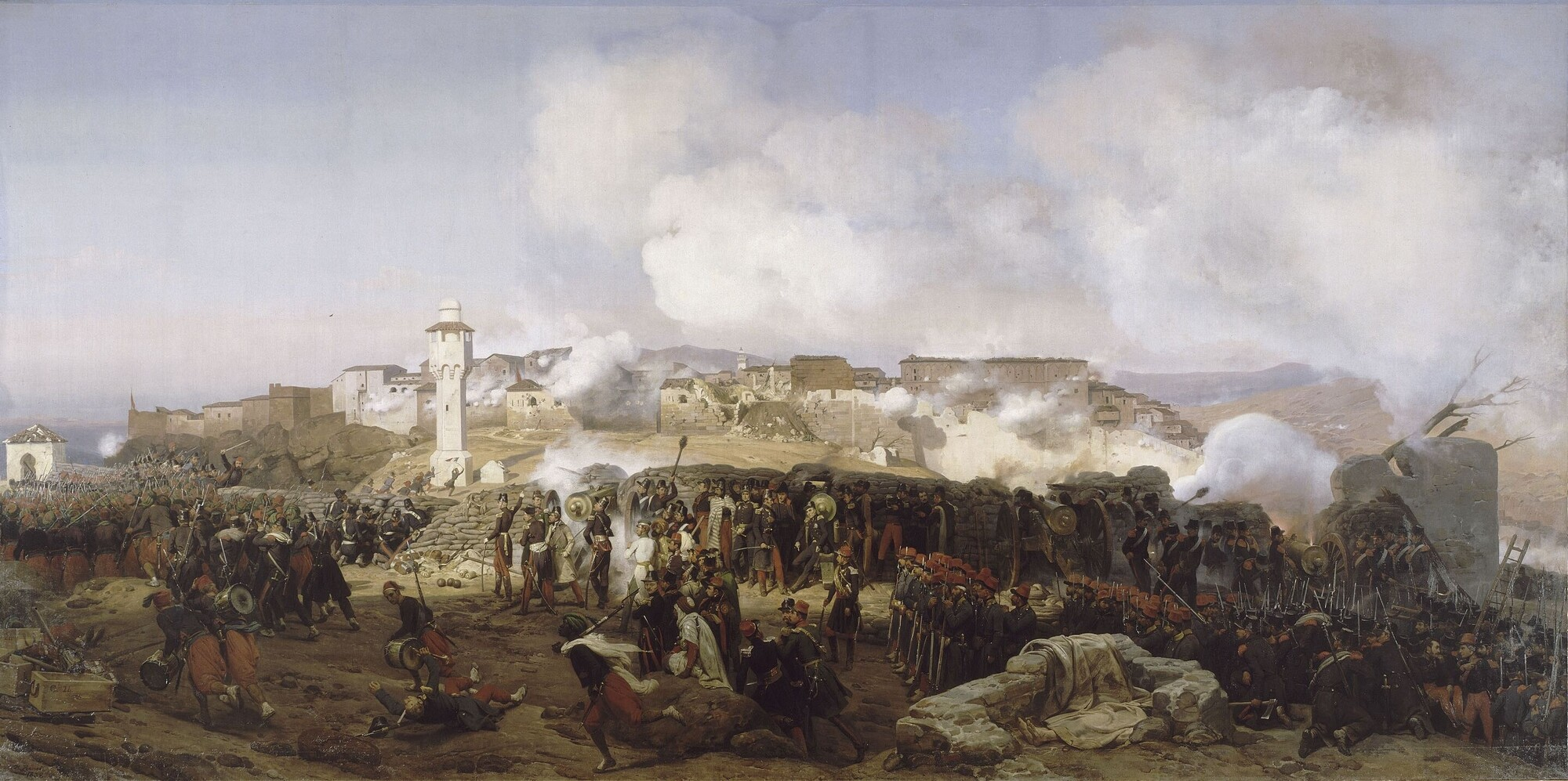 Prise de Constantine - Les colonnes d’assaut se mettent en mouvement - 13 octobre 1837